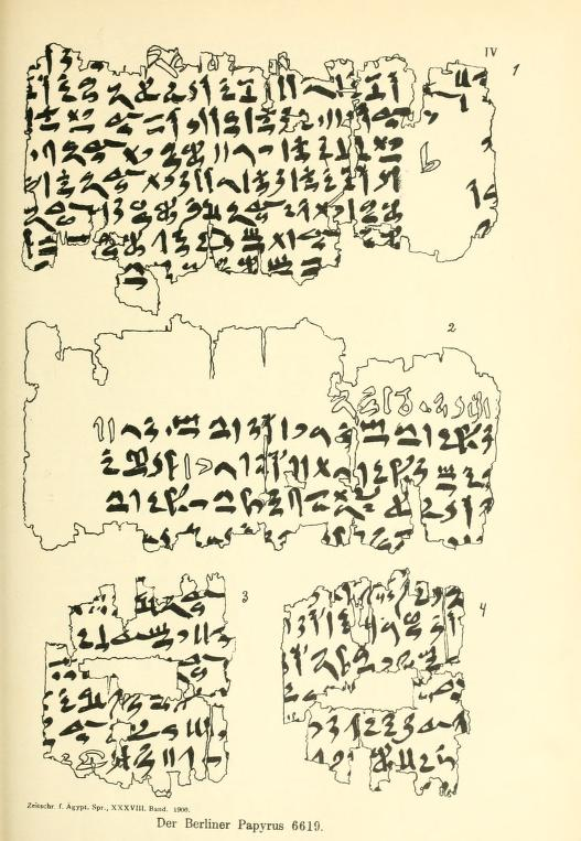 Fac-Similé du Papyrus Berlin 6619, page 138 de la première publication du fragment le plus important en 1900 par Hans Schlack-Schlackenburg